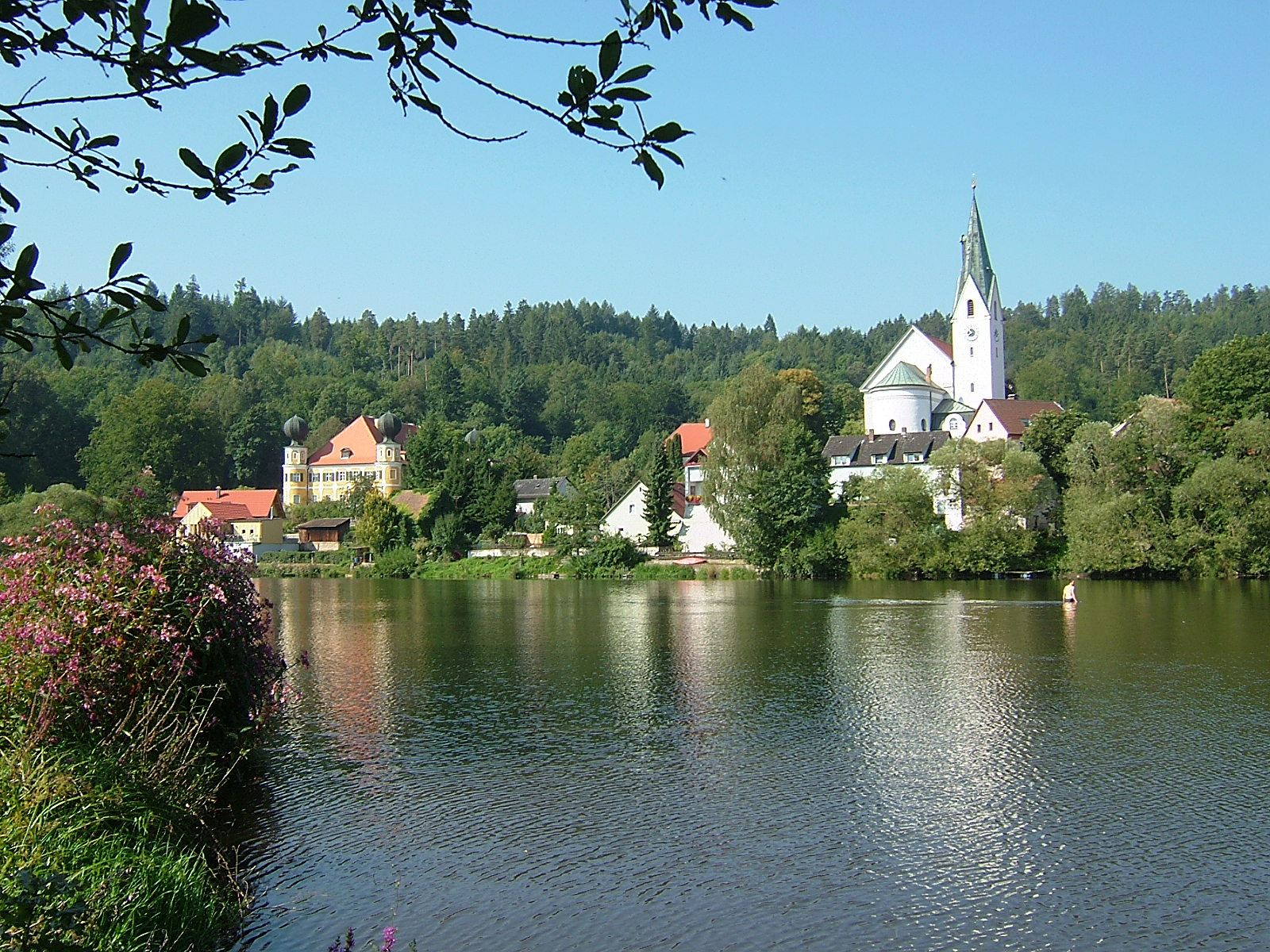 Ramspau